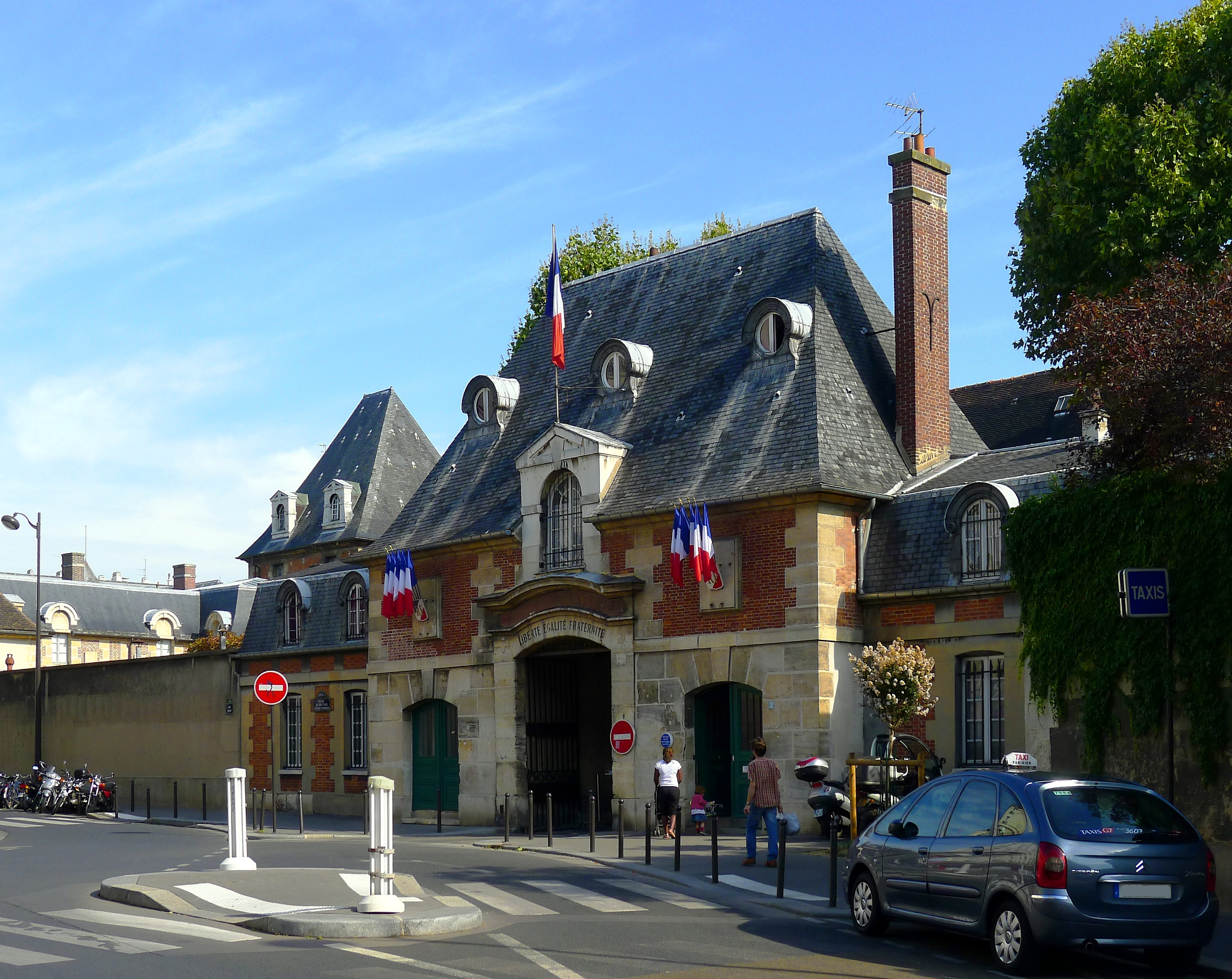 Ancien hôpital Saint-Louis - Paris X